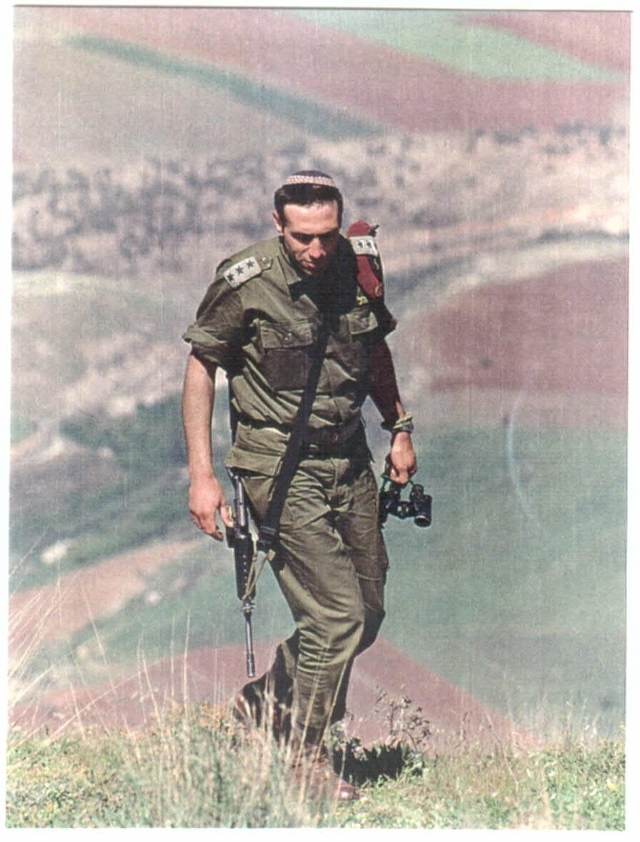 תמונה מהשירות הצבאי כמח"ט